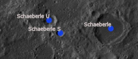 Cráter lunar Schaeberle. Cráteres satélite. (Imagen LRO)